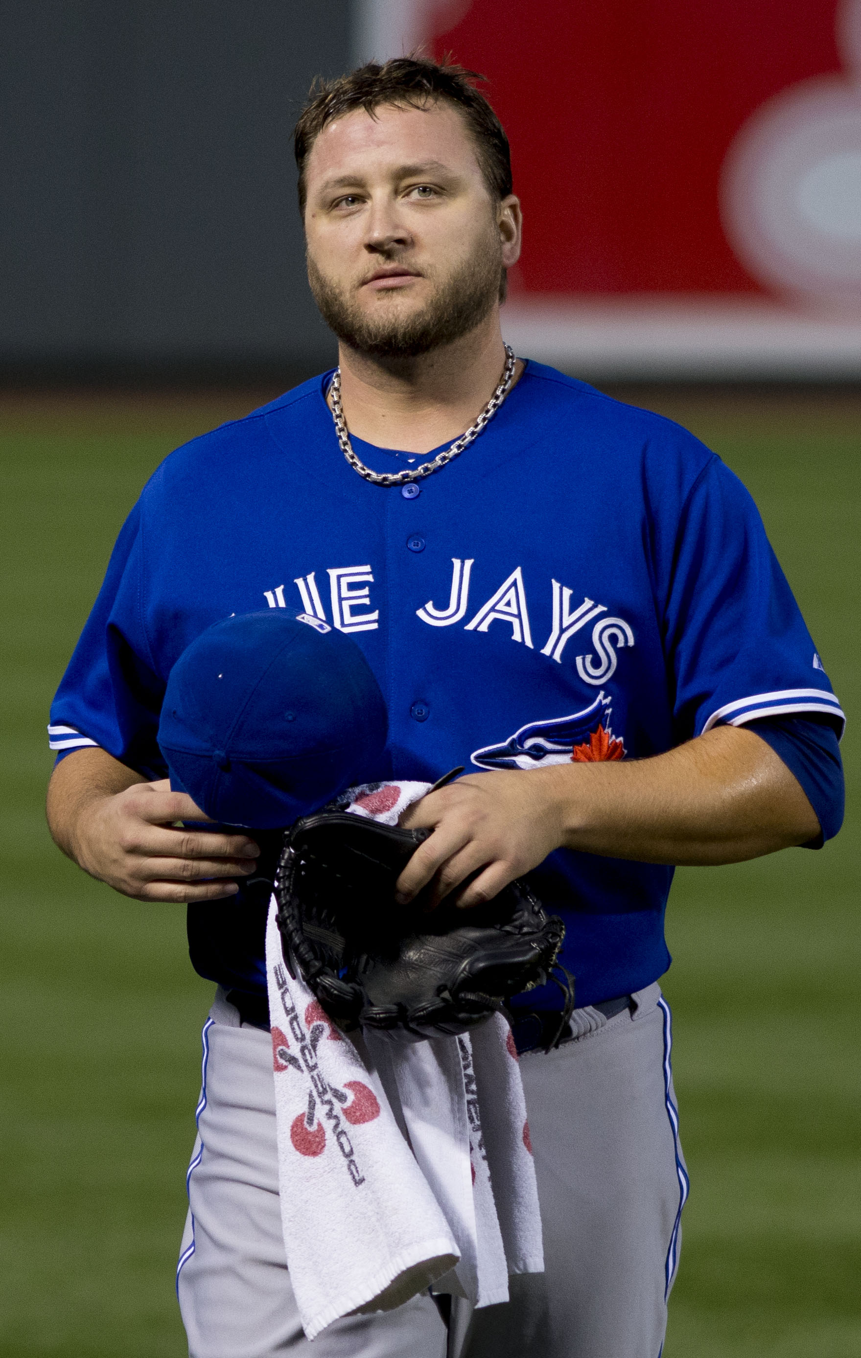 Mark Buehrle